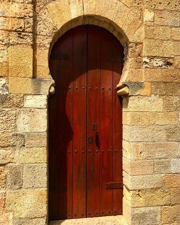 Puerta del Alminar de San Sebastián, Ronda.